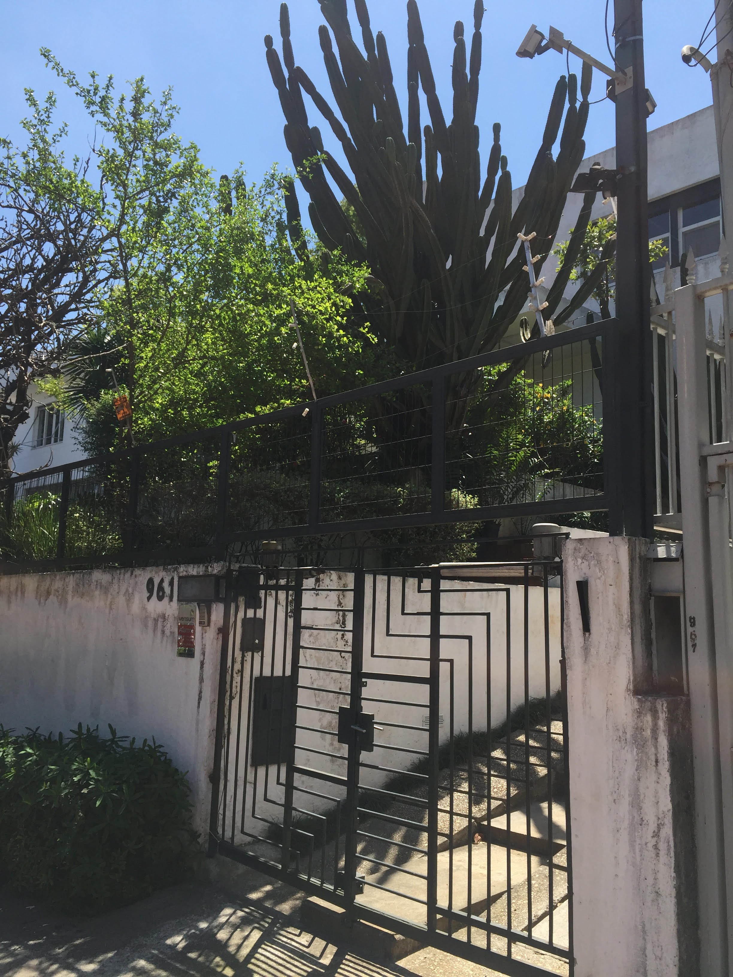 Fachada da Casa Modernista, na rua Itápolis, em São Paulo